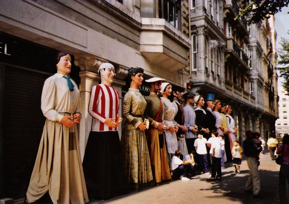 gigantes de bilbao